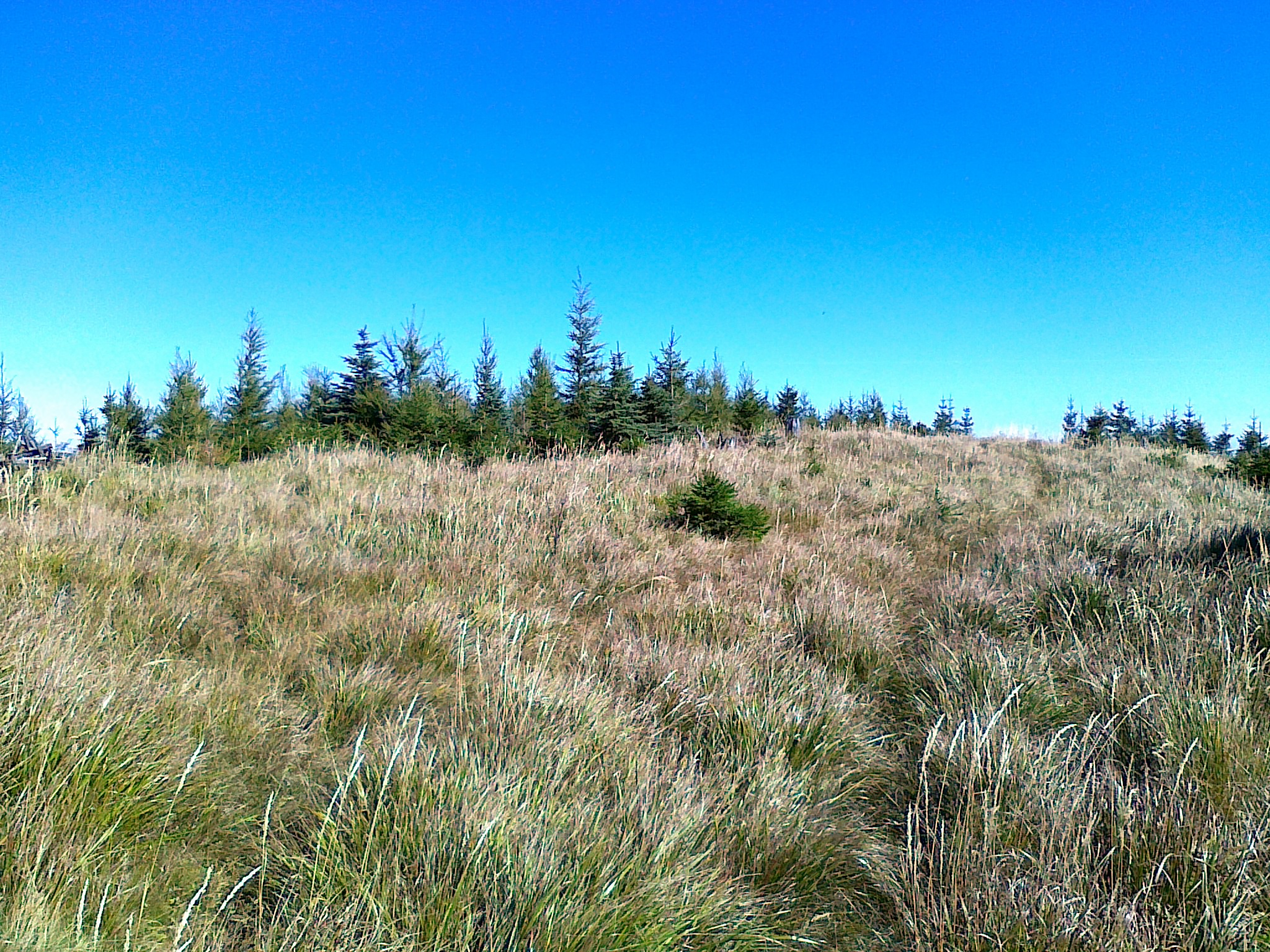 Szczyt góry Sokol - 1187 m n.p.m.